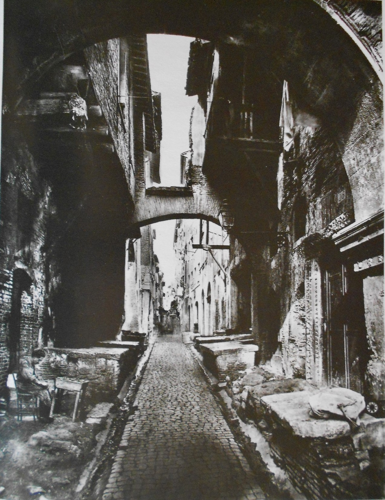 The ancient Via del Portico d'Ottavia in Rome (rione Sant'Angelo)